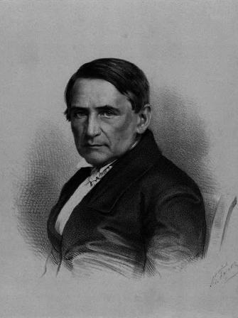 Аляксандр Граза